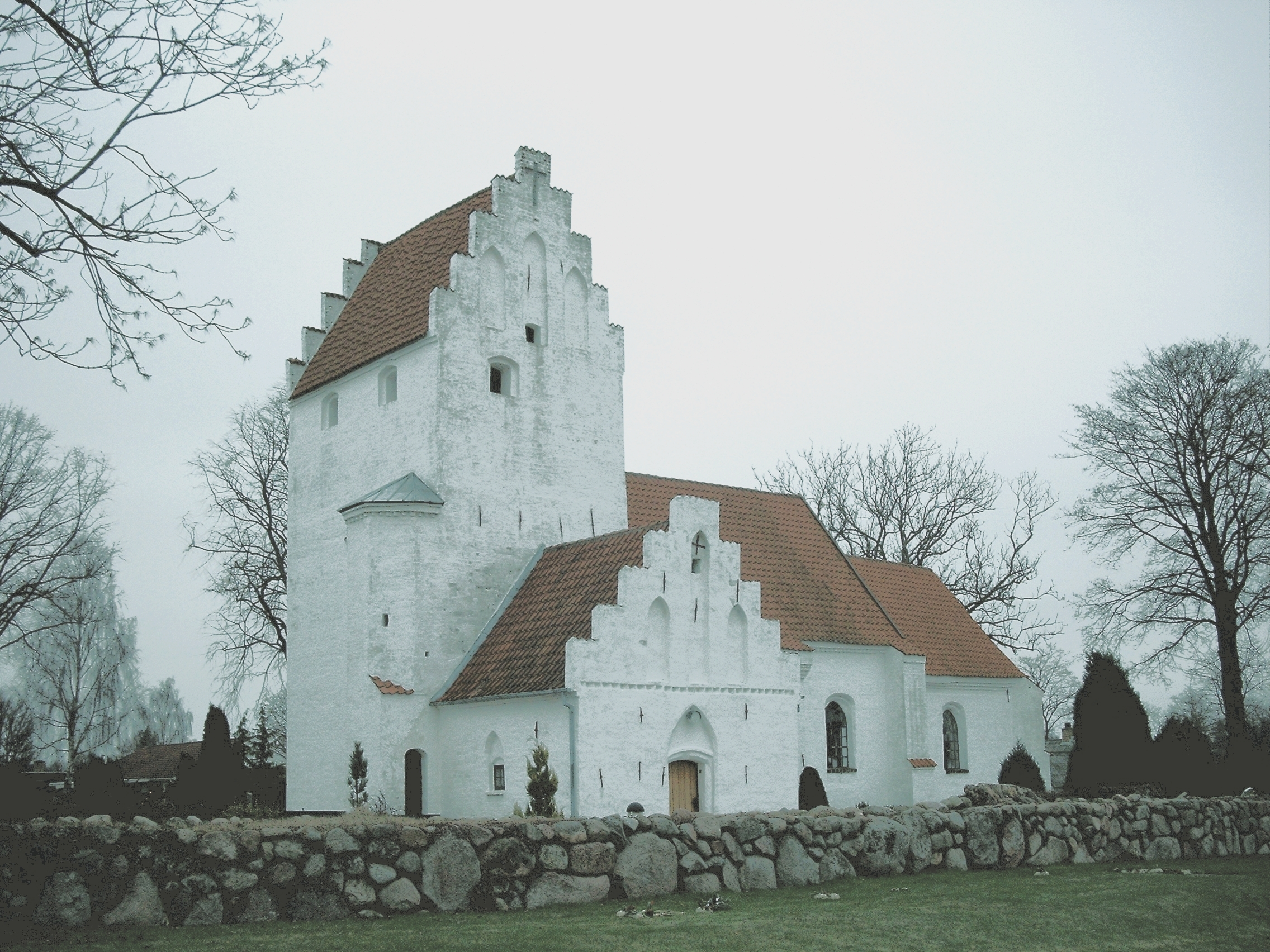 Bellinge kirke, Bellinge sogn, Odense Kommune (former: Odense Herred, Odense Amt).